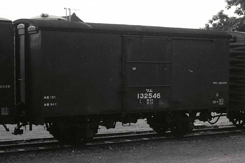 JNR Freight car, in Nagano prefecture, Japan. 国鉄ワム90000形有蓋車 ワム132546. 。ワム23000からの2段リンク改造で、ドアにリブのある一般的なタイプ。長野県で撮影。（ハーフサイズのため画質悪し）